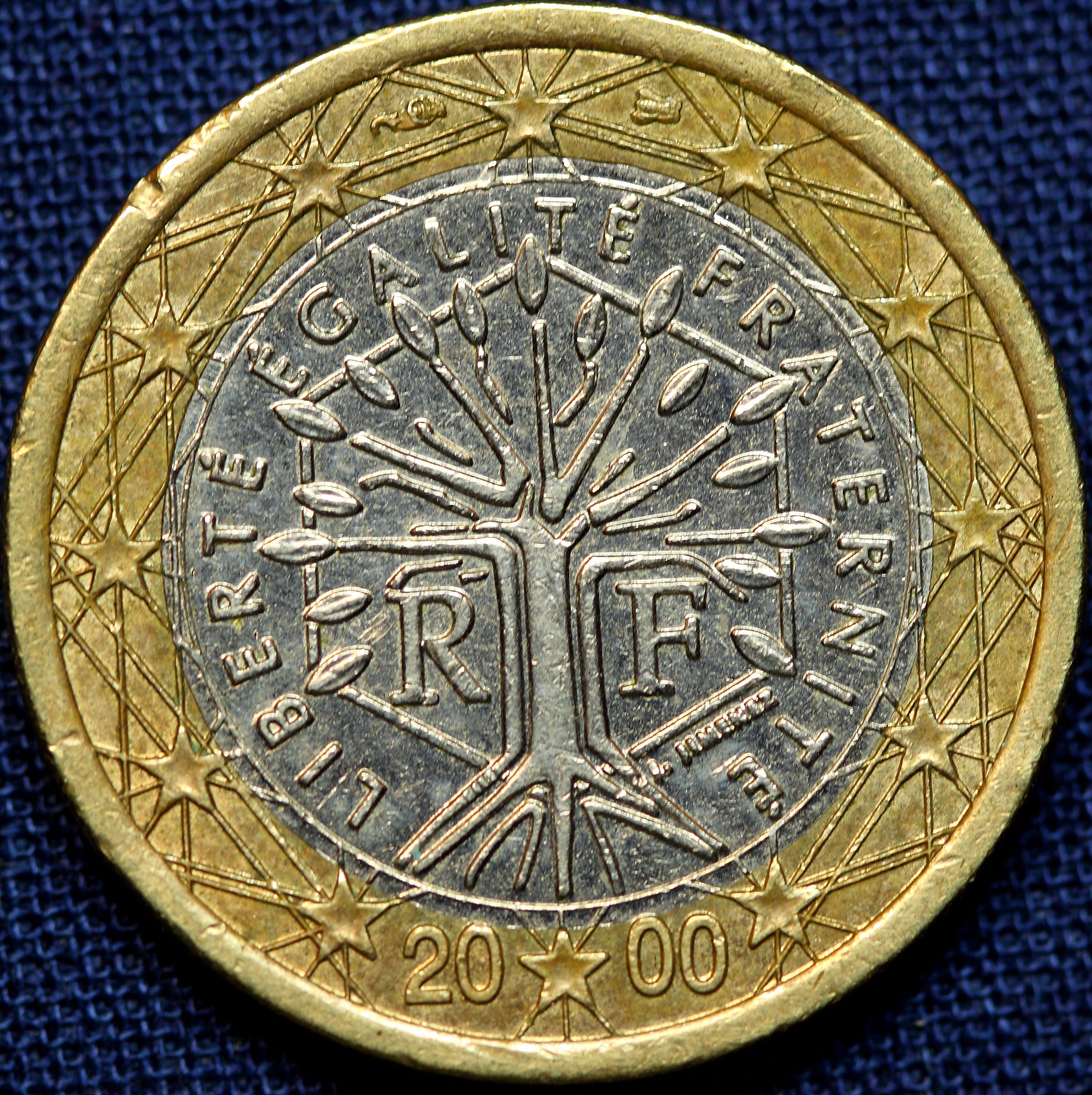 2000 Euro France